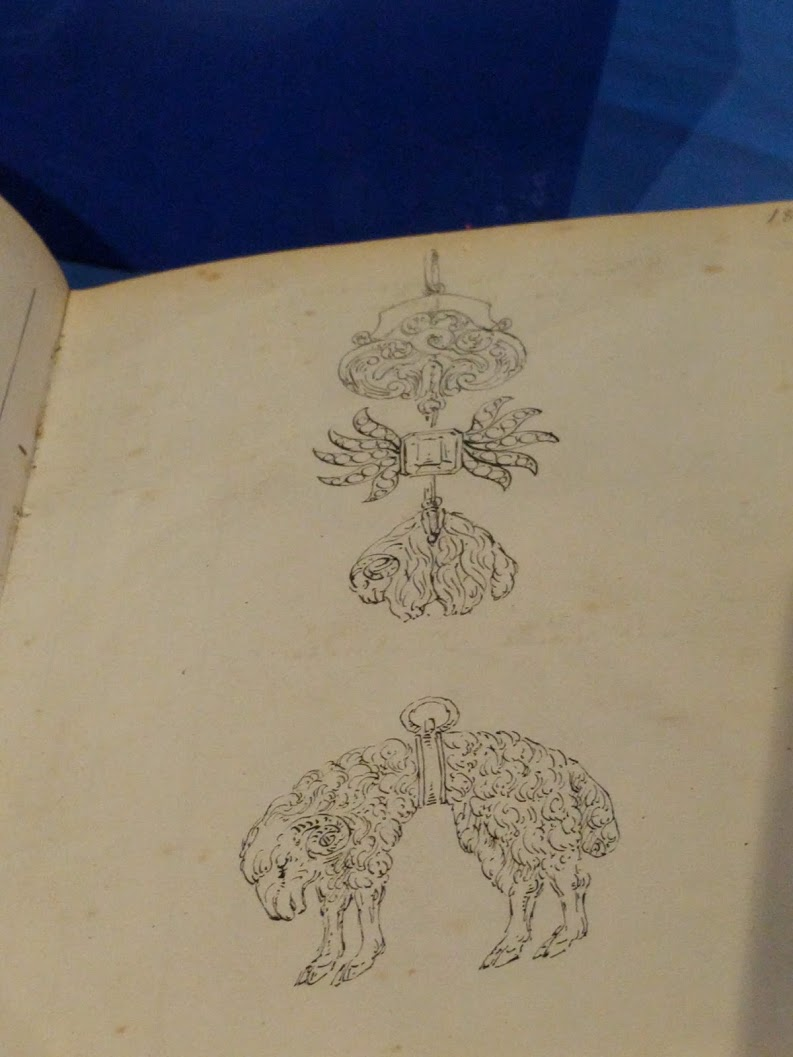 Tekening uit schetsboek van de Leblanc Granger en Gutperle van de Grafische Sammlung Stern